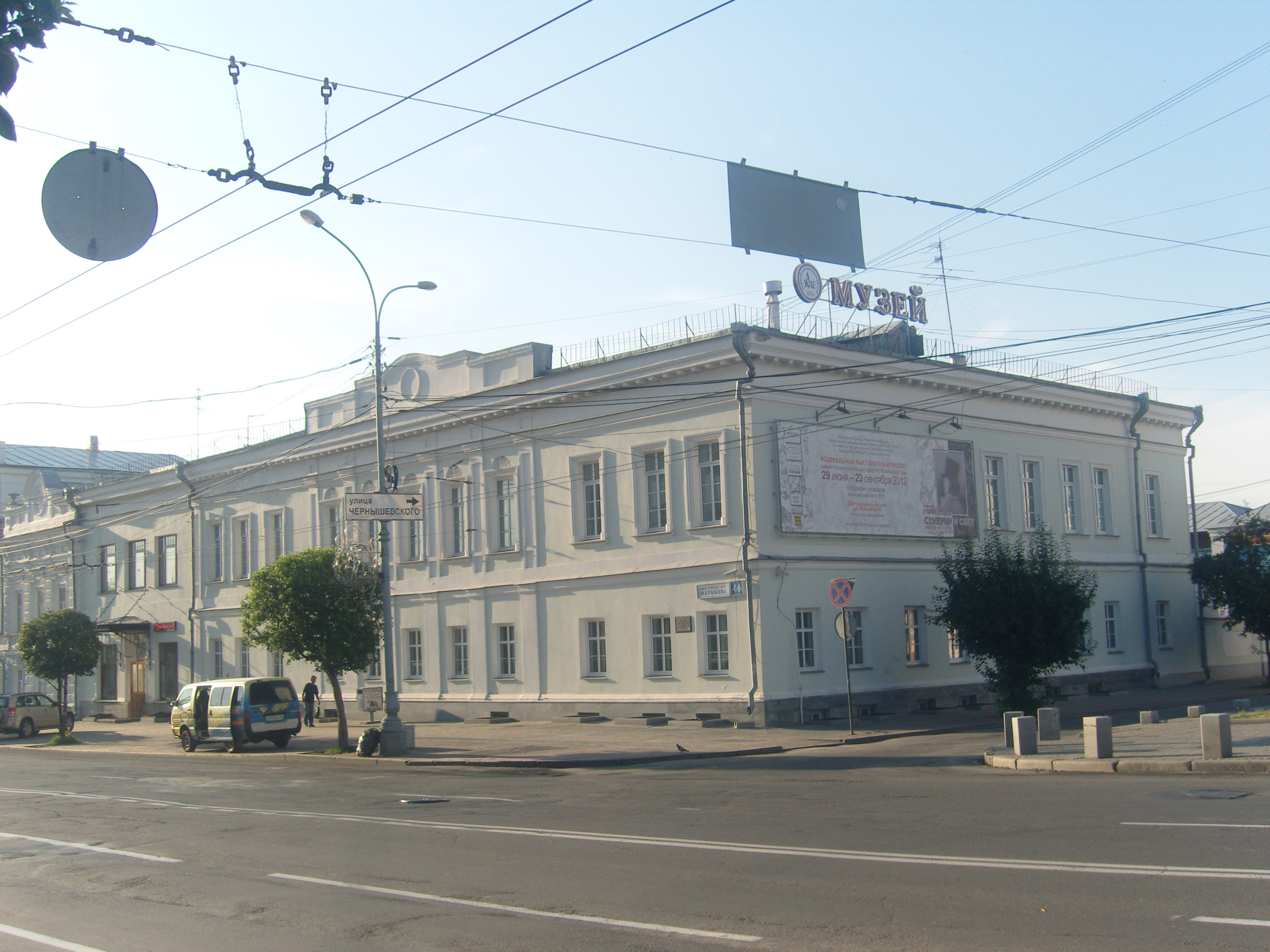 Угол улиц Чернышевского - Малышева в Екатеринбурге. Здание старой городской Думы.